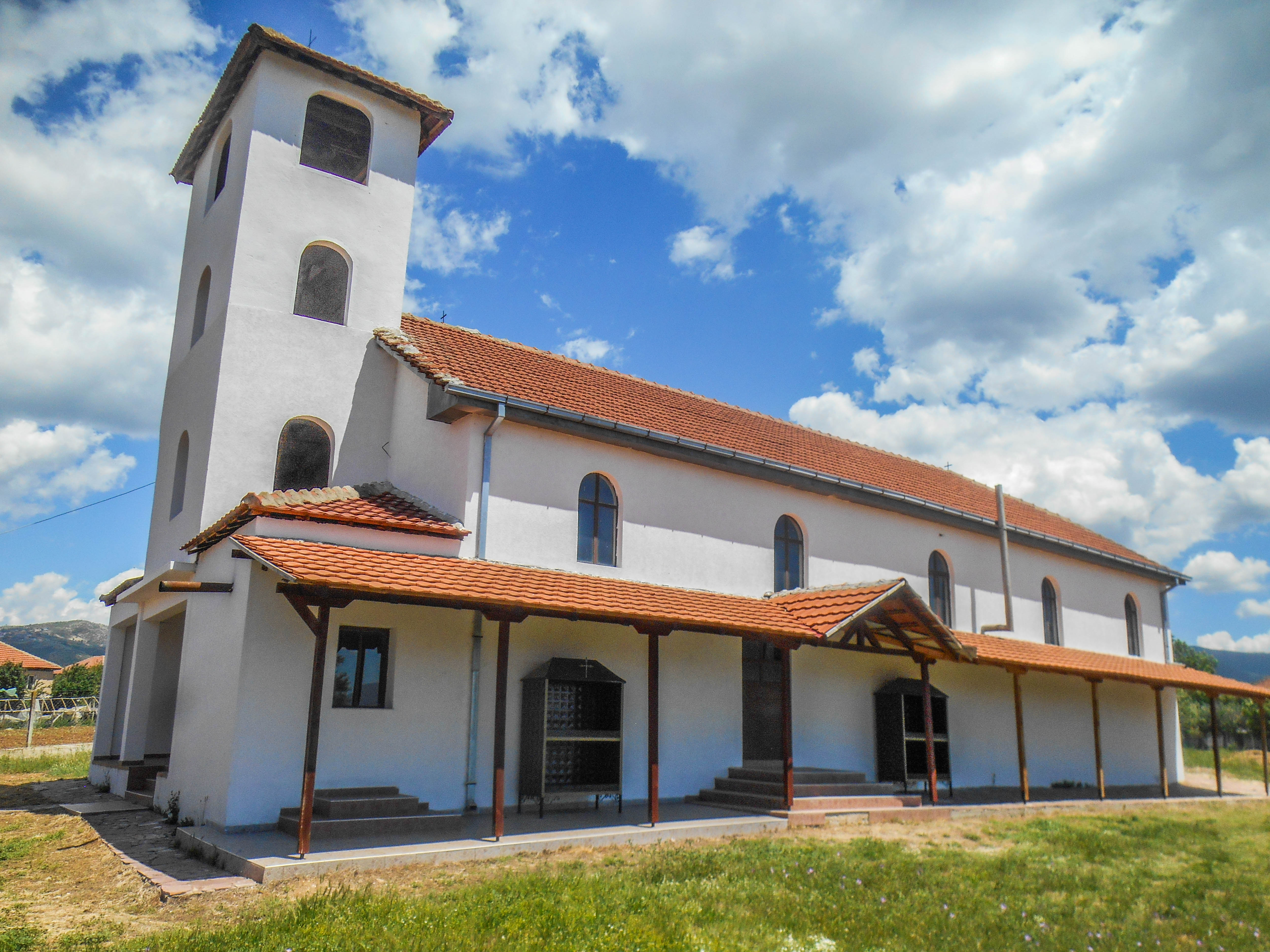 Црква „Св. Троица“ - Доброшинци